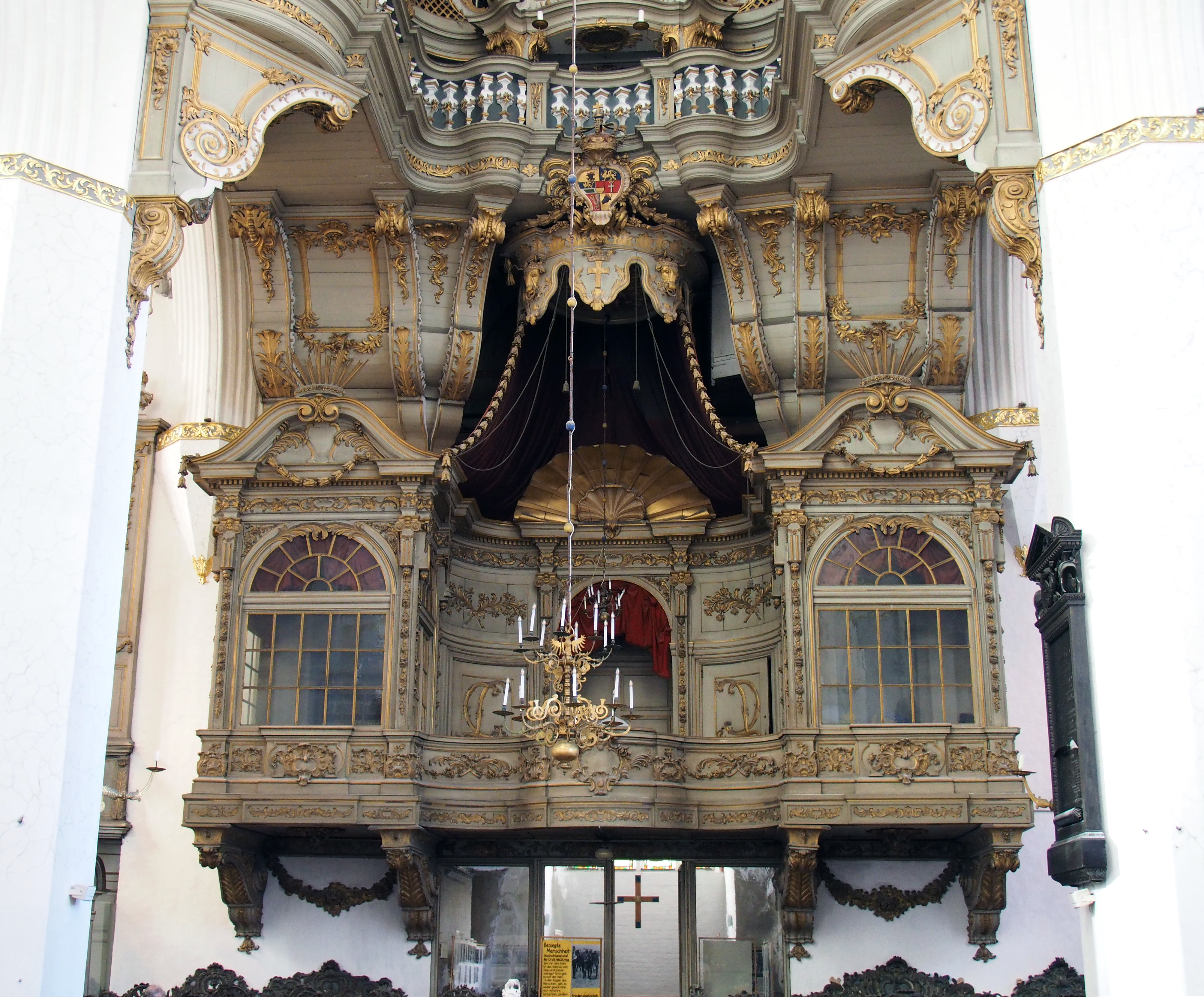 Fürstenempore von 1750, Erbauer Christian Ludwig II.